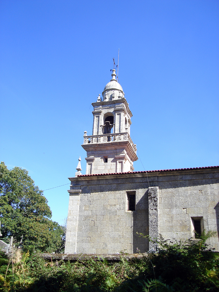 En Verín/Ourense